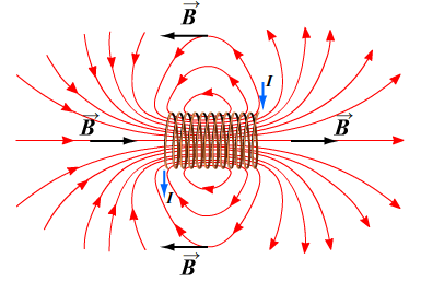 индукция магнитного поля